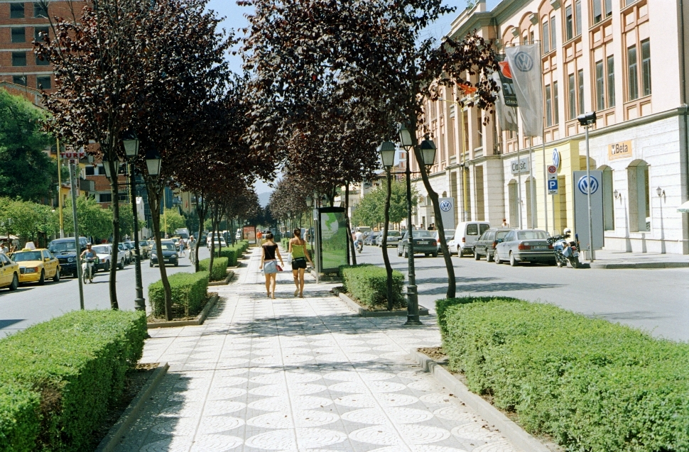 Lungo rruga e Kevaje, sulla passeggiata pedonale fatta costruire da Edi Rama